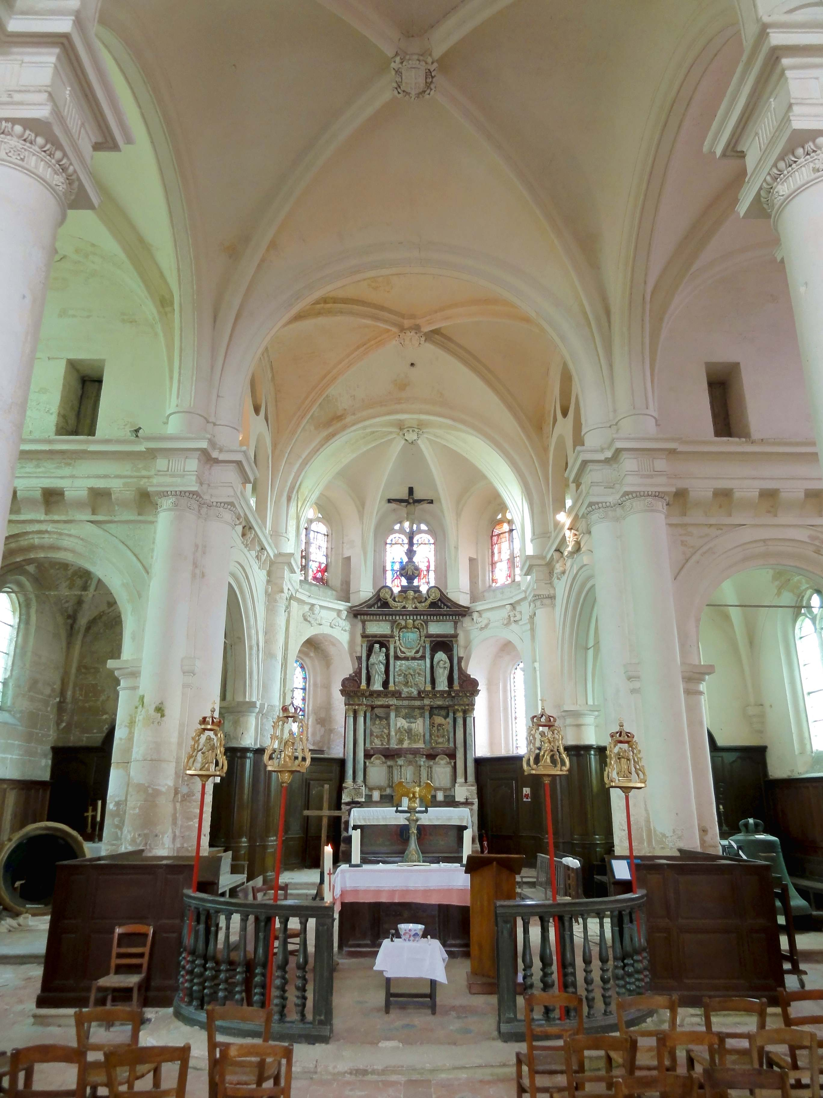 Intérieur de l'église (voir titre).